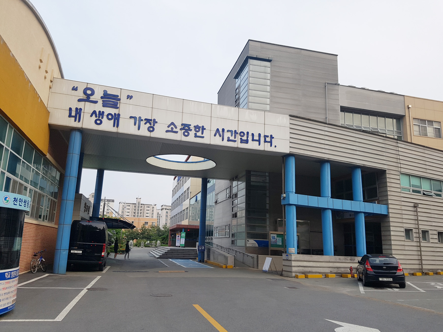 천안쌍용고등학교 정문